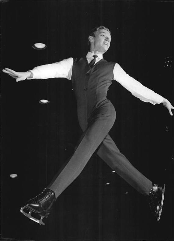 Bodo Bockenauer Zentralbild Kohls 8.12.1963 Olympia-Ausscheidungen im Eiskunstlauf stehen bevor. Um die noch zu vergebenden Plätze für die gemeinsame deutsche Olympiamannschaft geht es bei den Olympia-Ausscheidungen zwischen den Eiskunstläufern der DDR und Westdeutschland, die am 12.12.1963 in der Berliner Werner-Seelenbinder-Halle und am 19.12.1963 in Westberlin stattfinden. UBz: In vollendeter Haltung meistert hier Bodo Bockenauer (SC Dynamo Berlin) diesen Sprung.